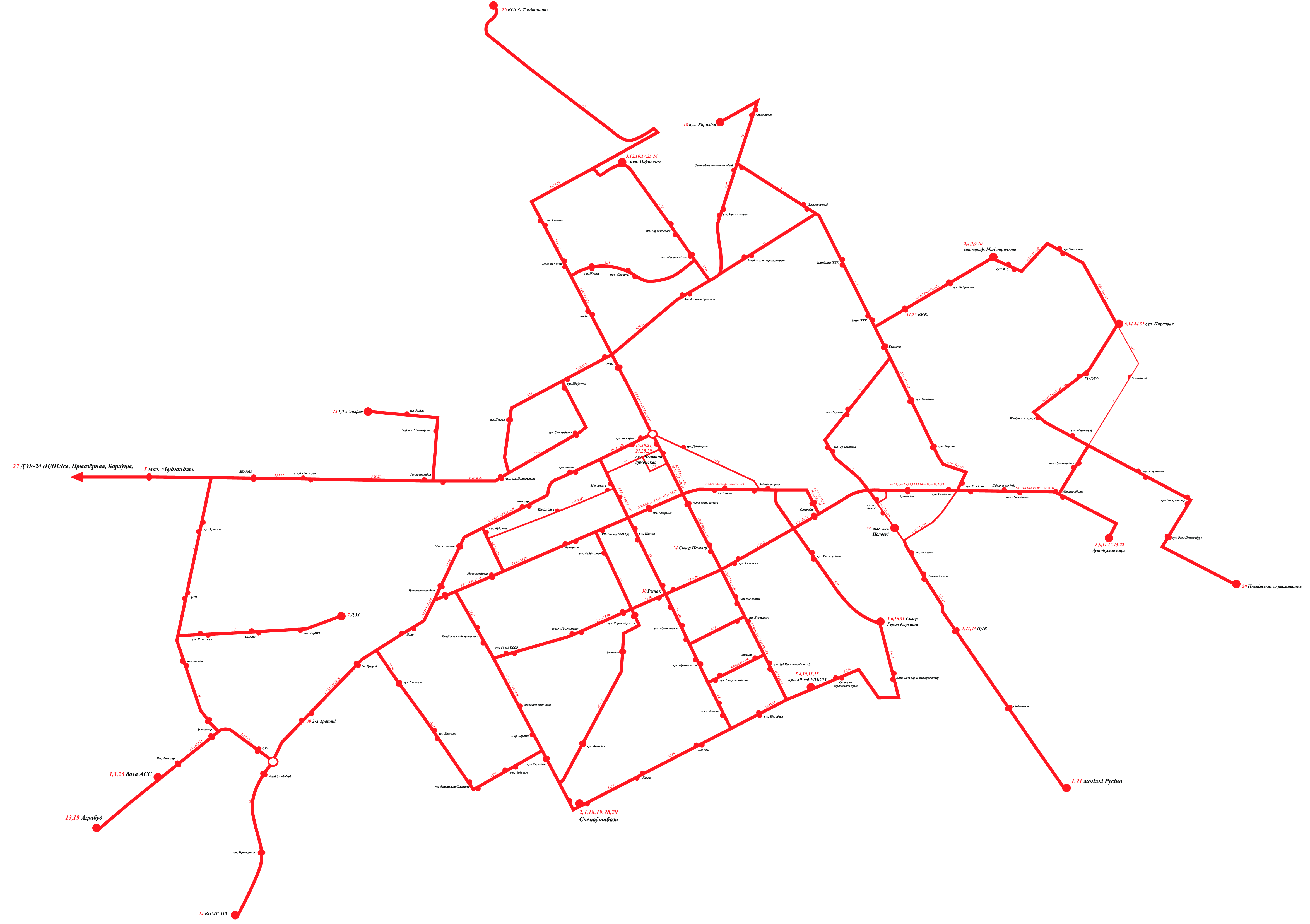 Схема руху аўтобусаў г. Баранавічы